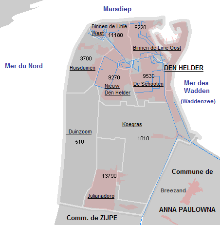 Gemeente Den Helder, Noord-Holland.